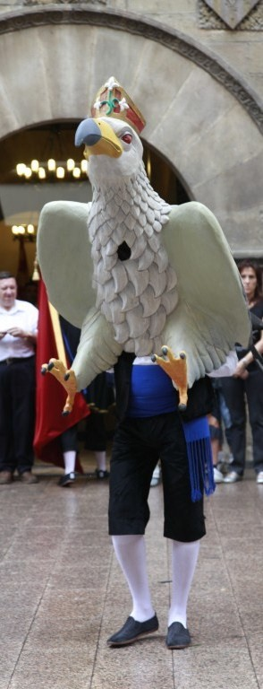 L'Àliga de Lleida al Corpus del 2010